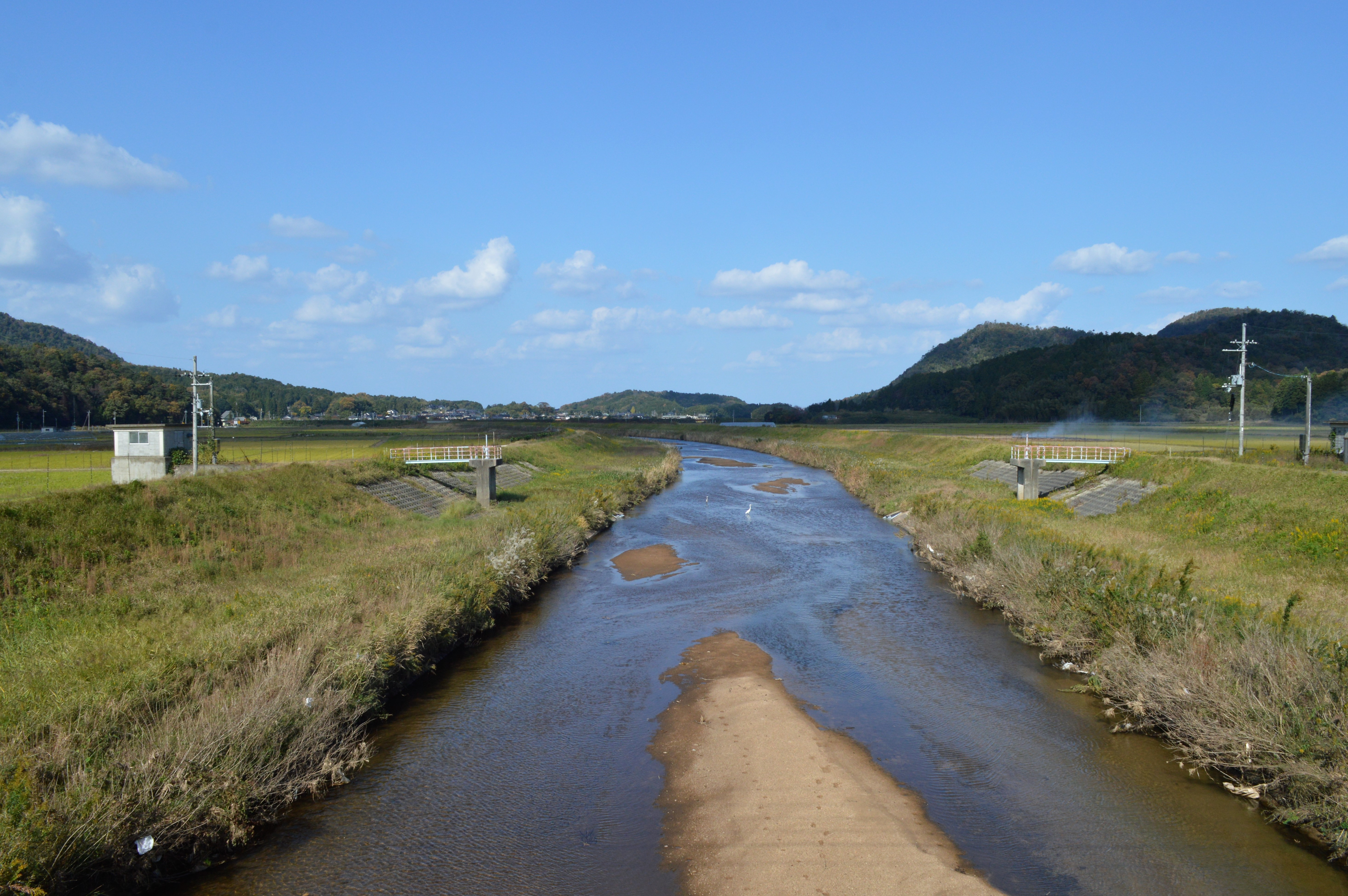 京丹後市久美浜町の川上谷川。下流（北）を向いて撮影。